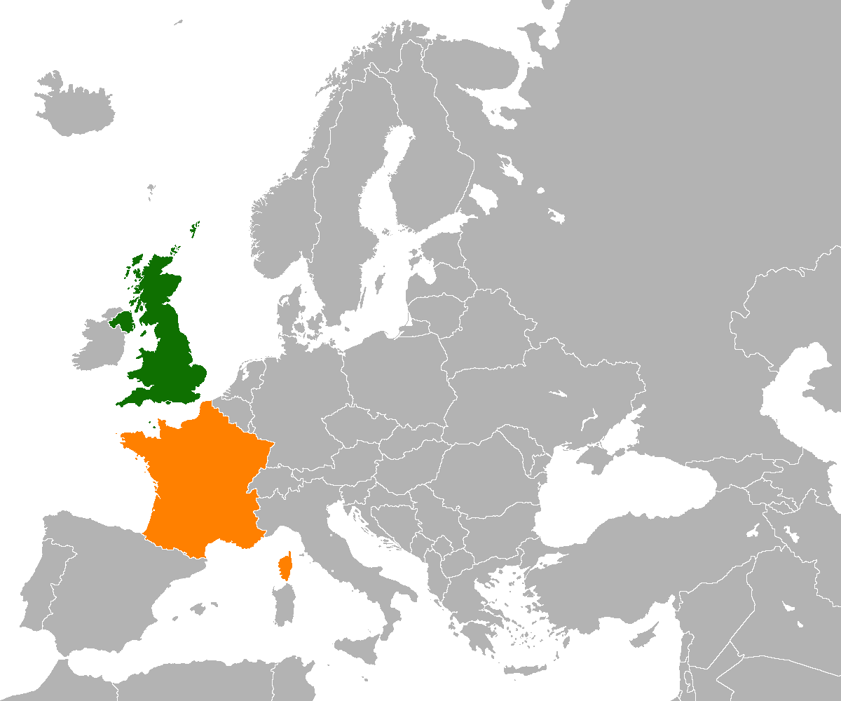 UK - France